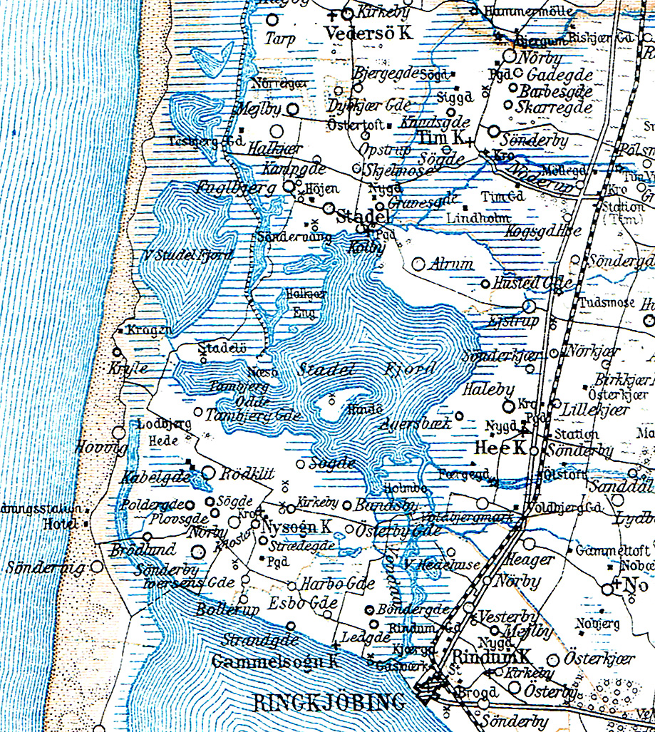 Kort over Stadil Fjord Ringkøbing Amt